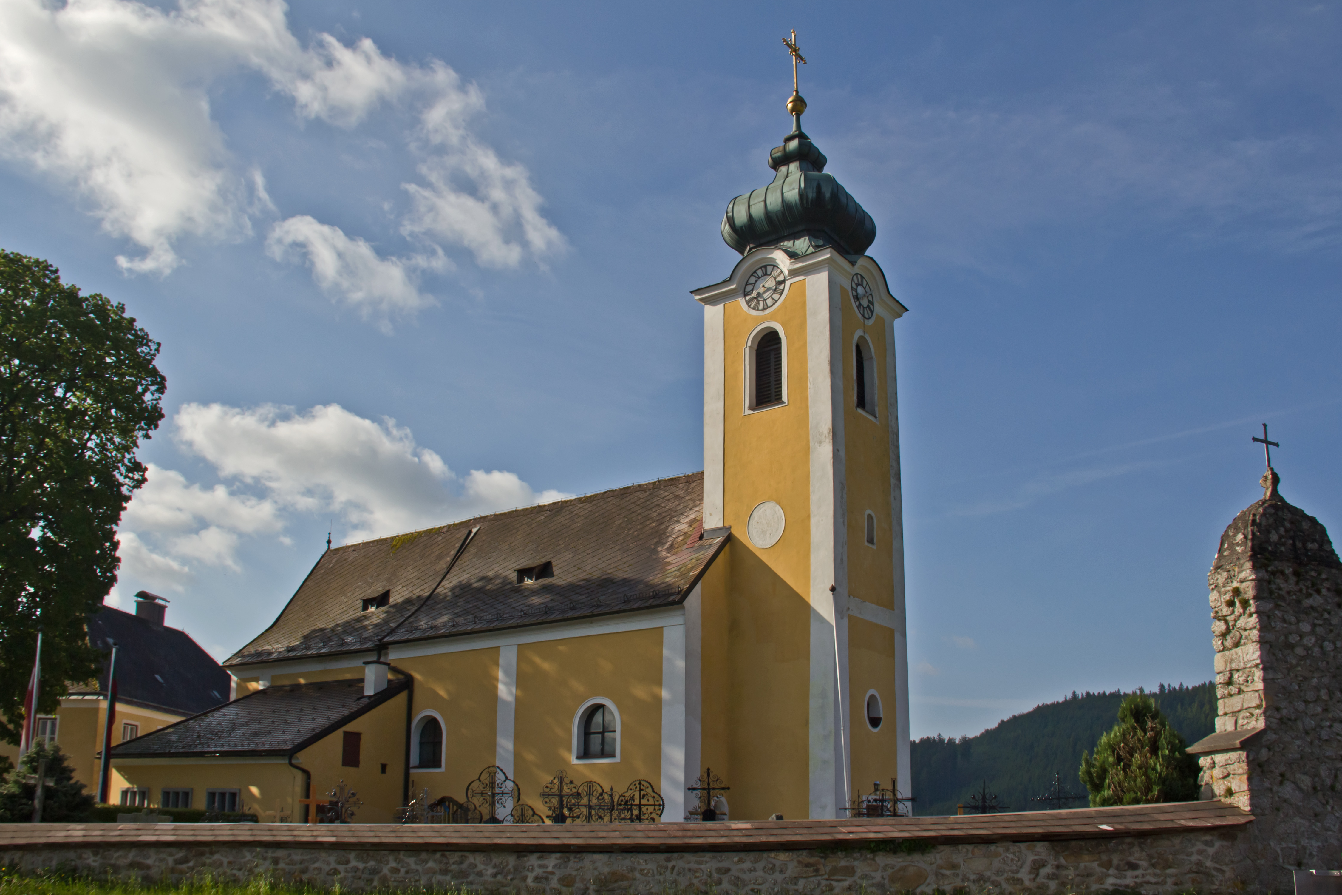 Die am östlichen Ortsrand etwas erhöht gelegene und von einem Friedhof umgebene Pfarrkirche hl. Ulrich ist ein schlichter, barockisierter Saalbau mit gotischem Chor und spätbarockem Westturm.